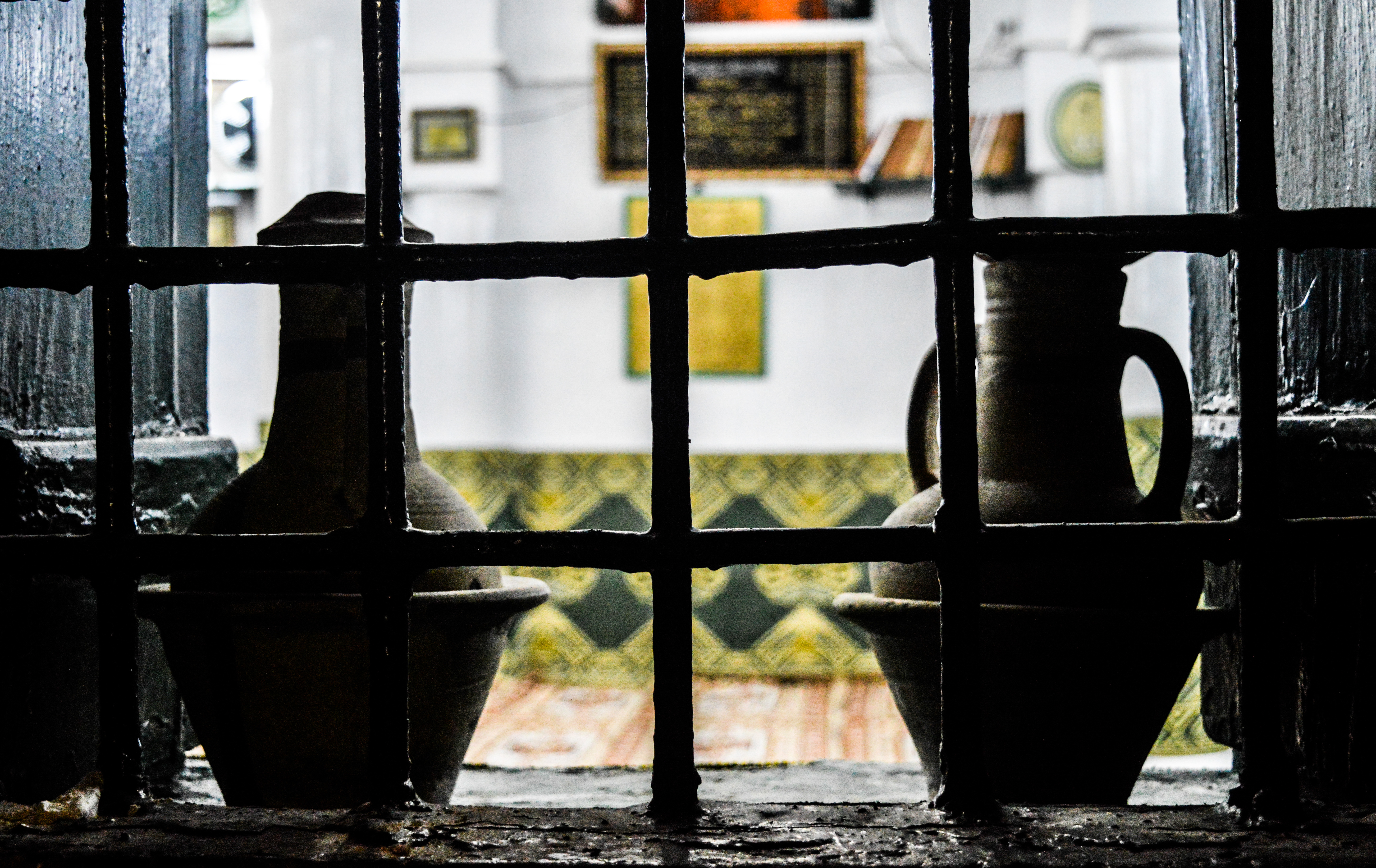 Mosquée Djama-el-Bahri